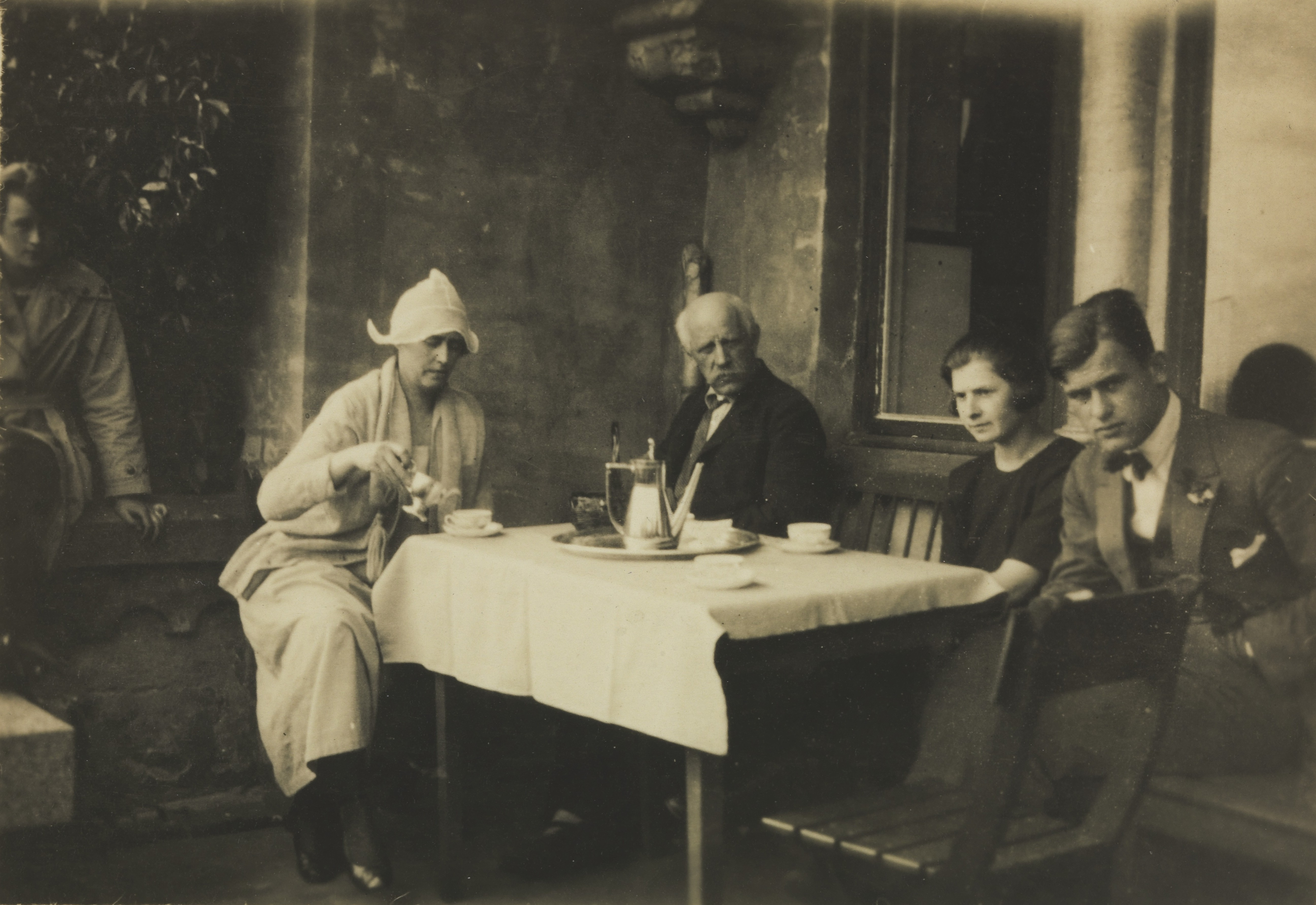 Ved kaffebordet på Polhøgda. Fra venstre sitter Sigrun Nansen, Fridtjof Nansen, Kari Hirsti (forlovet med Odd) og Odd Nansen (arkitekt). Depicted person: Nansen, Sigrun (1869-1957); født Sandberg; gift første gang Munthe Depicted person: Nansen, Fridtjof (1861-1930) Depicted person: Hirsti, Kari Depicted person: Nansen, Odd (1901-1973) Depicted place: Akershus, Bærum